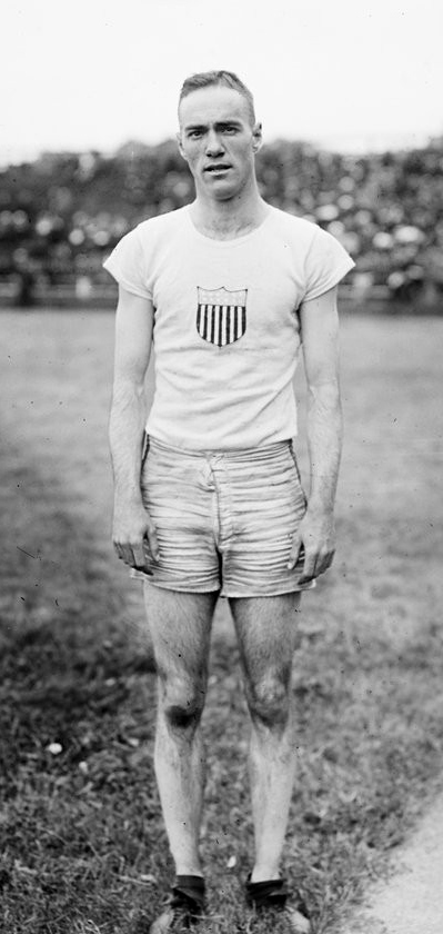 28-8-20, Colombes, [Harold] Barron (am[éricain]) [vainqueur du] 110 m haies